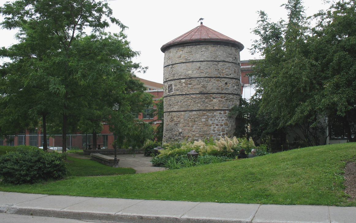 Parc du Moulin-de-l'Hôpital et Moulin à vent de l'Hôpital-Général-de-Québec, Boulevard Langelier, Ville de Québec (Québec) Canada